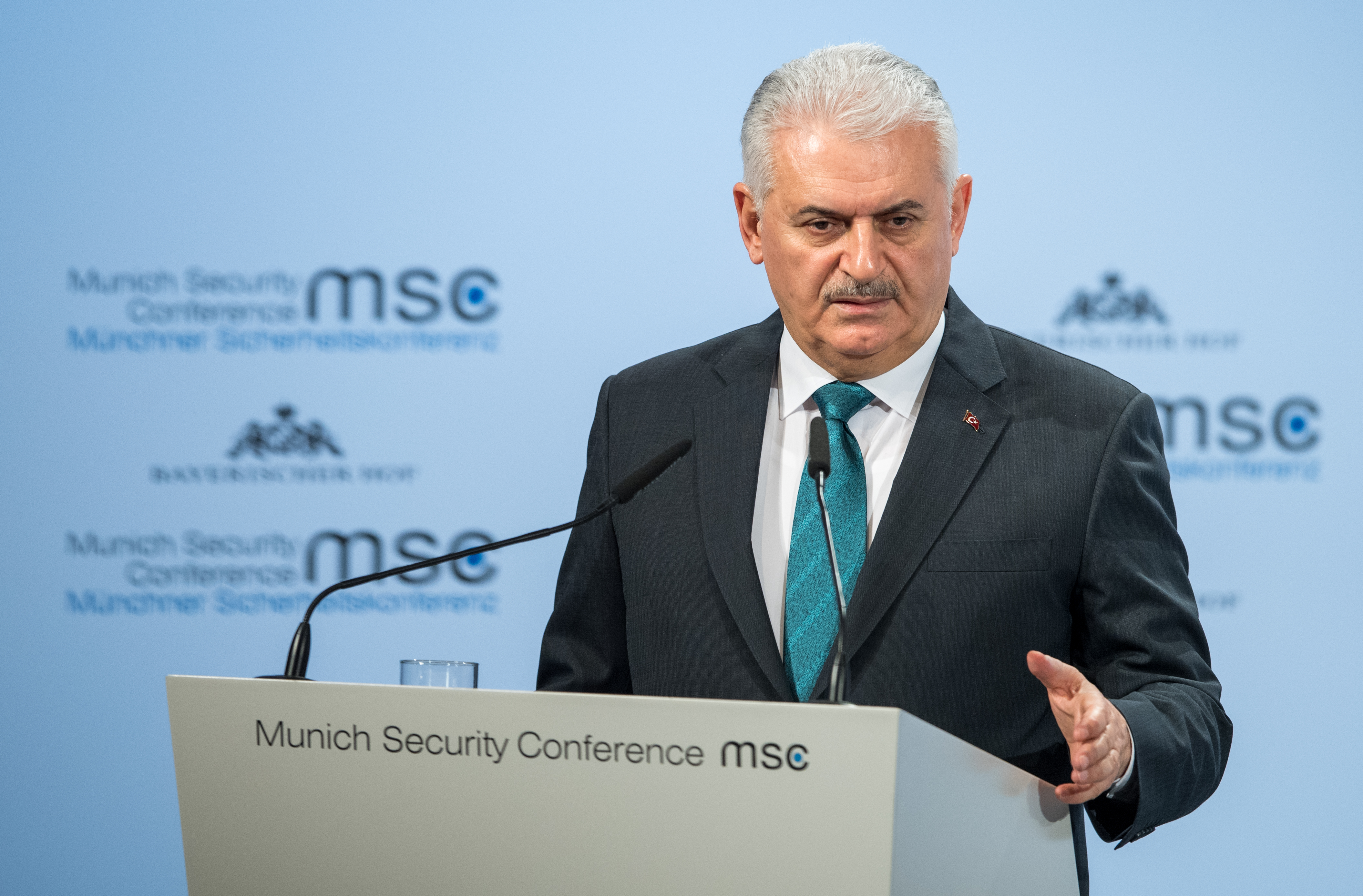 Binali Yıldırım während der Münchener Sicherheitskonferenz 2018